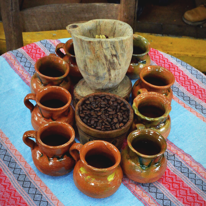 Café veracruzano, con tacitas de barro y mortero tradicionales! Delicioso aroma